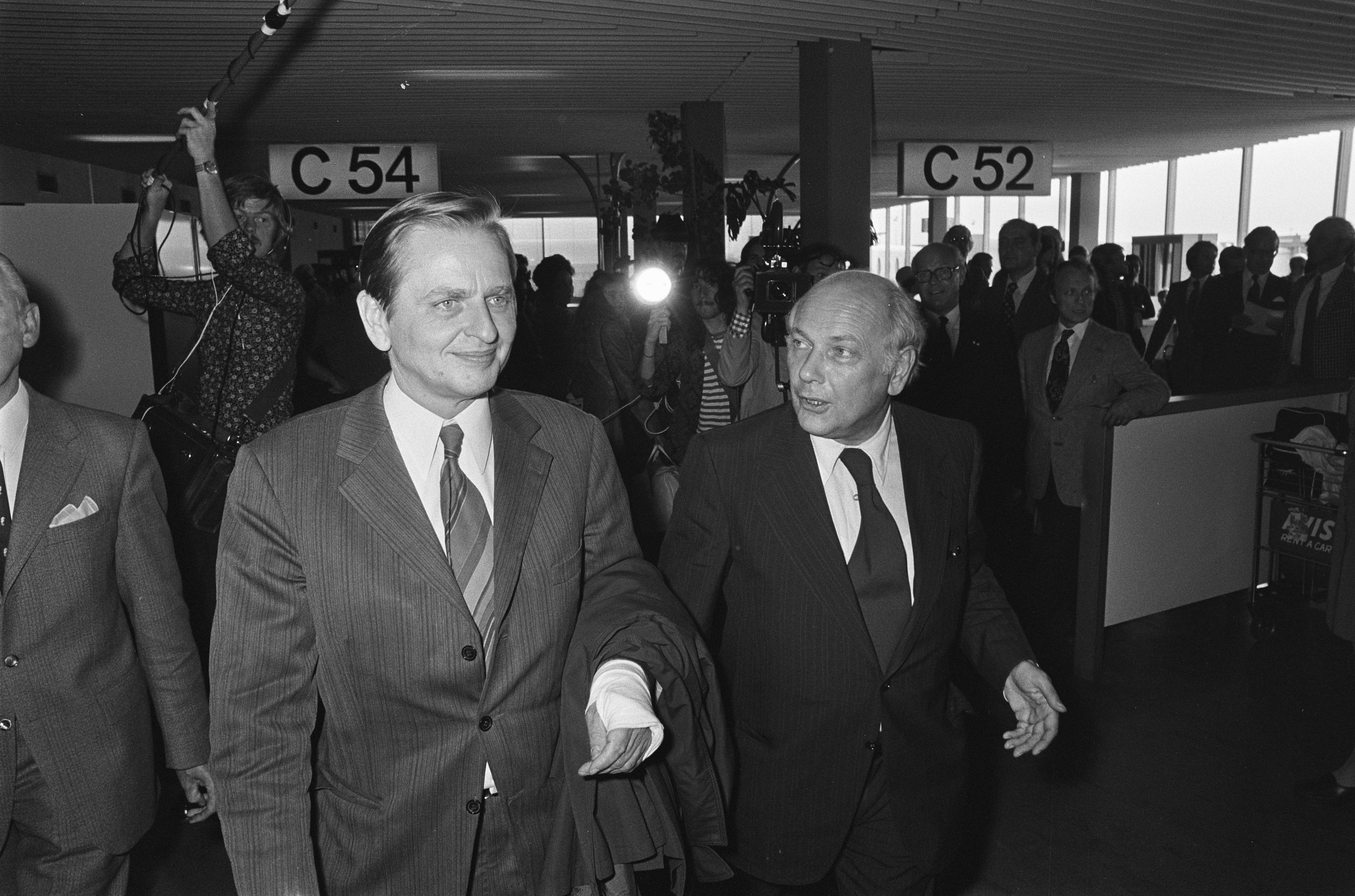 Collectie / Archief : Fotocollectie Anefo Reportage / Serie : [ onbekend ] Beschrijving : Zweedse premier Olof Palme komt aan op Schiphol; premier Palme en premier Den Uyl (r) in aankomsthal Datum : 11 september 1974 Locatie : Noord-Holland, Schiphol Trefwoorden : premiers Persoonsnaam : Palme, Olof, Uyl, Joop den Fotograaf : Verhoeff, Bert / Anefo Auteursrechthebbende : Nationaal Archief Materiaalsoort : Negatief (zwart/wit) Nummer archiefinventaris : bekijk toegang 2.24.01.05 Bestanddeelnummer : 927-4444